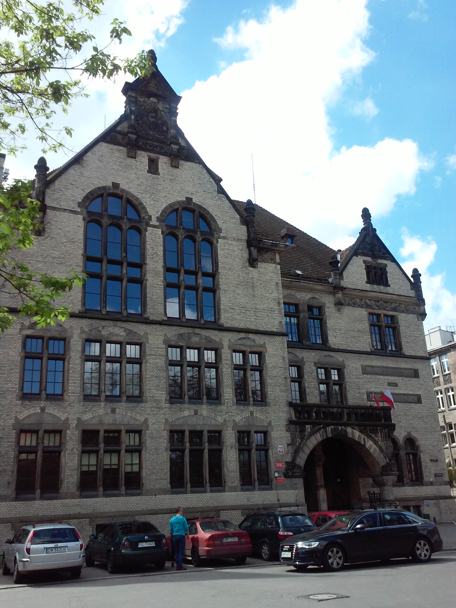 Wrocław, budynek główny Instytutu Pedagogiki i Psychologii Uniwersytetu Wrocławskiego. Wikidata has entry Q30075445 with data related to this item.